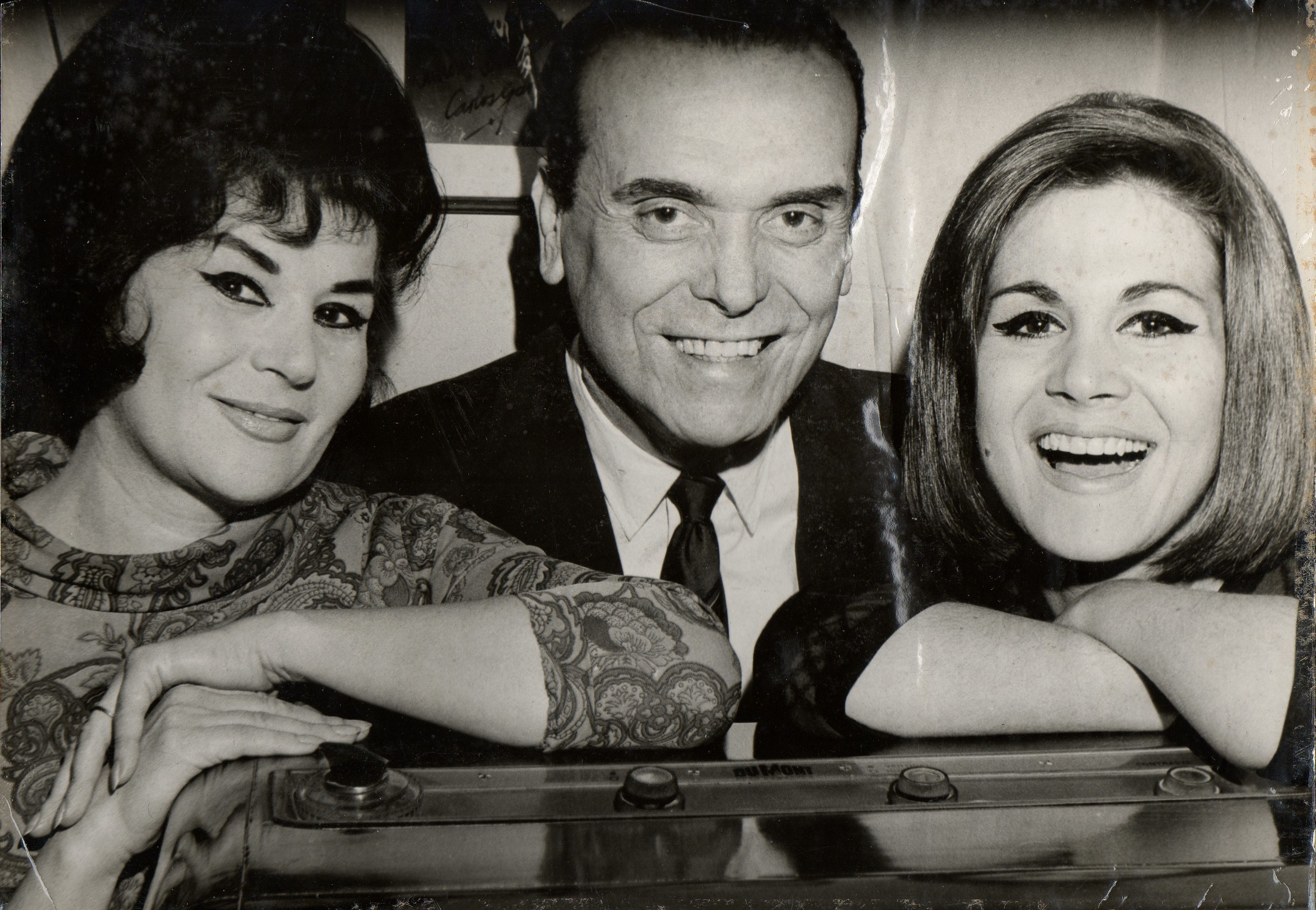 Pedro Laurenz con Elsa y Maria Cristina